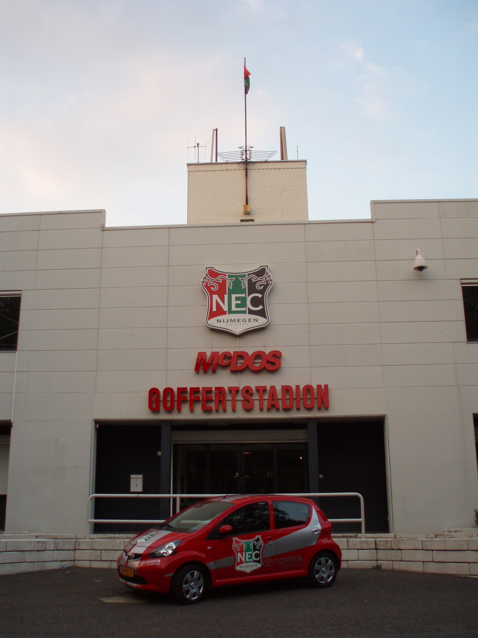 eigen foto (c) 2006 looi